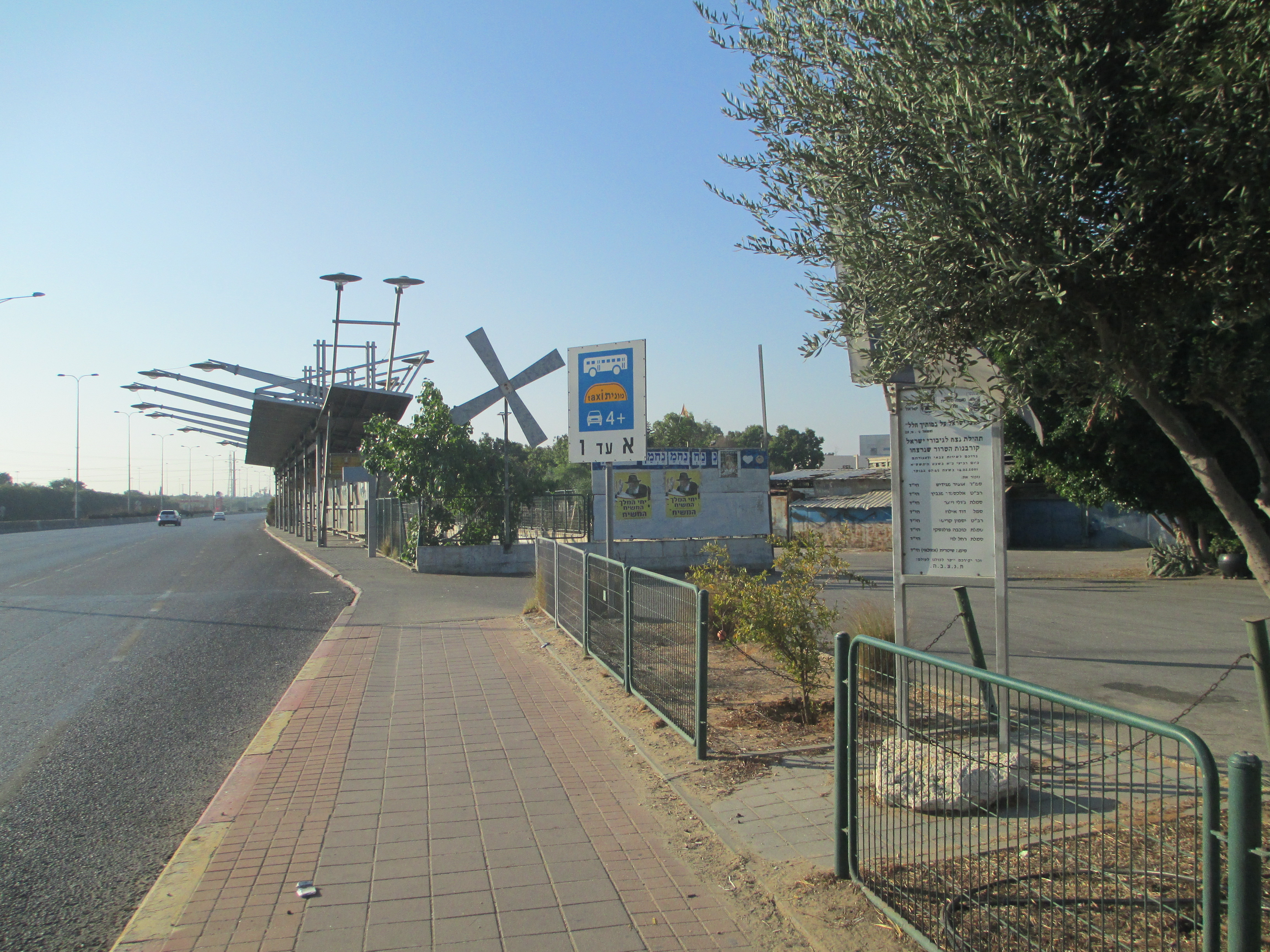 האנדרטה במקום הפיגוע באזור ב-2001